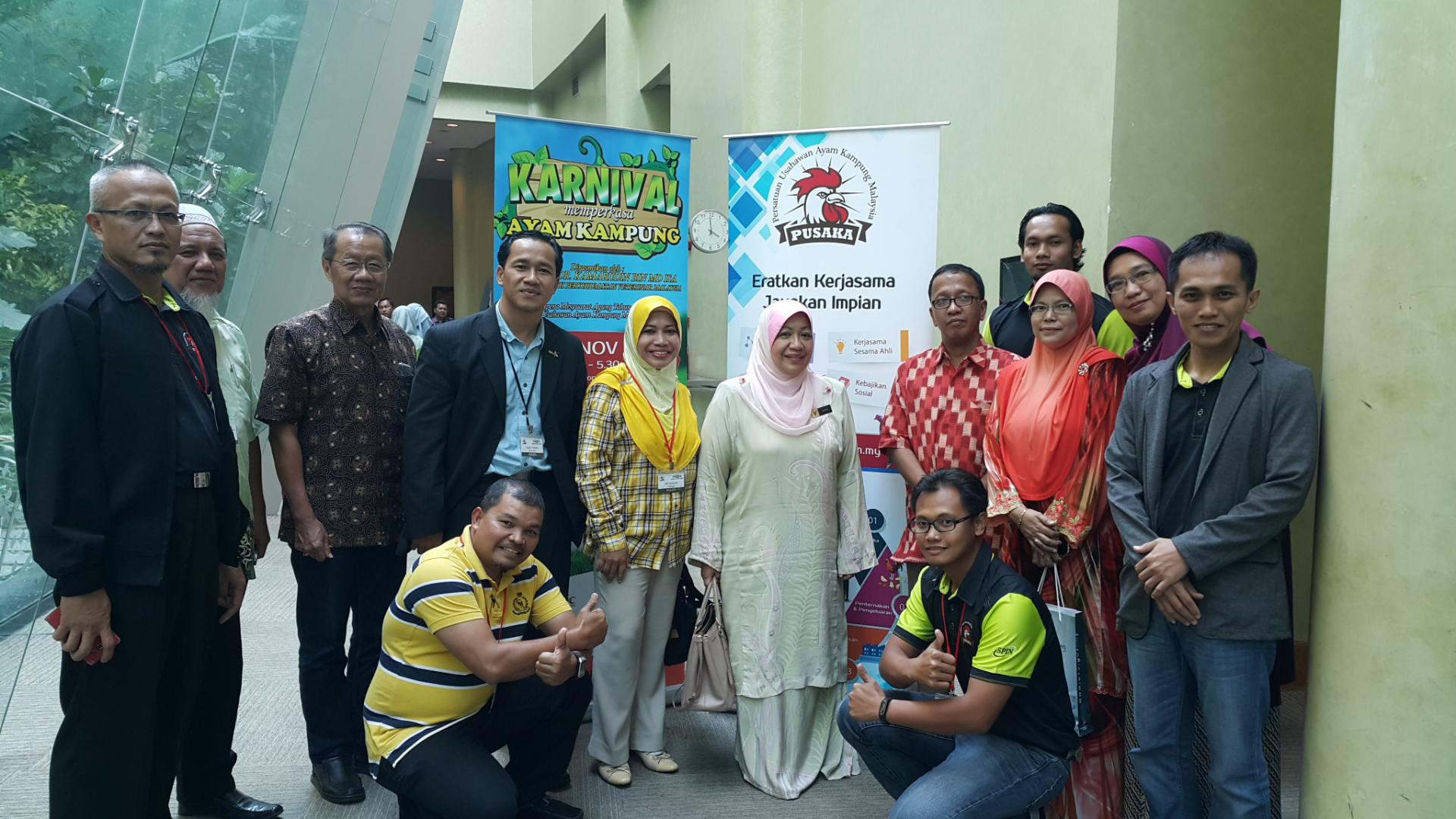 Karnival Ayam Kampung